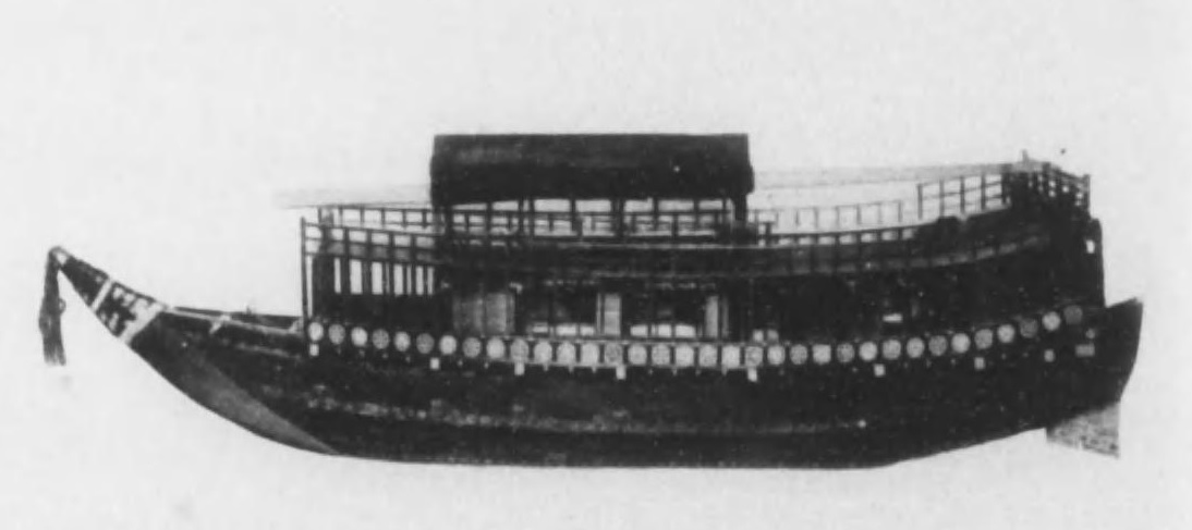 雛形丸 嘉永3年（1850年）鳥羽藩舟手頭中村傳六・河村傳七製作 木製漆塗り、長さ5尺5寸（167cm）、幅1尺5寸（45cm）、高さ1尺7寸（52cm） 神宮徴古館旧蔵、昭和20年戦災で焼失